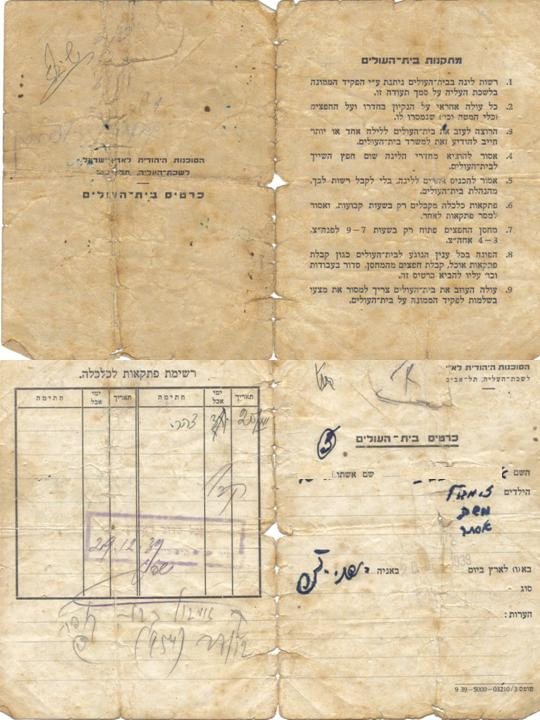 כרטיס בית עולים, שניתן בתל אביב, למעפילי האניה רודניצ'אר ג', שהגיעו באופן בלתי ליגאלי, לחוף מול נתניה בנובמבר 1939, כפליטים מבולגריה, בעקבות "המסע לגירוש נתינים זרים", שערך הממשל הפרו-פשיסטי.